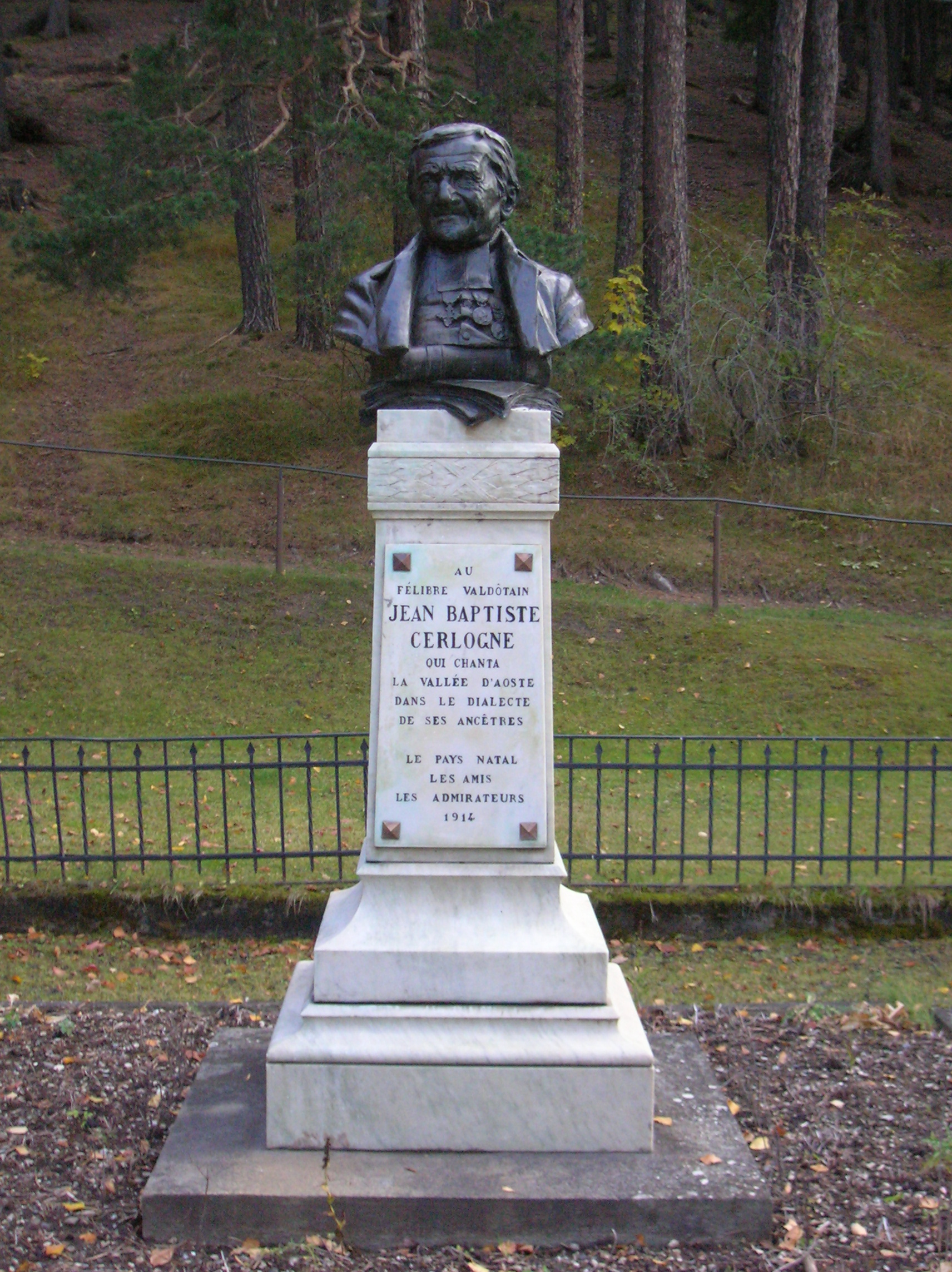 Monumento a Jean-Baptiste Cerlogne, a Saint-Nicolas, Valle d'Aosta, Italia.